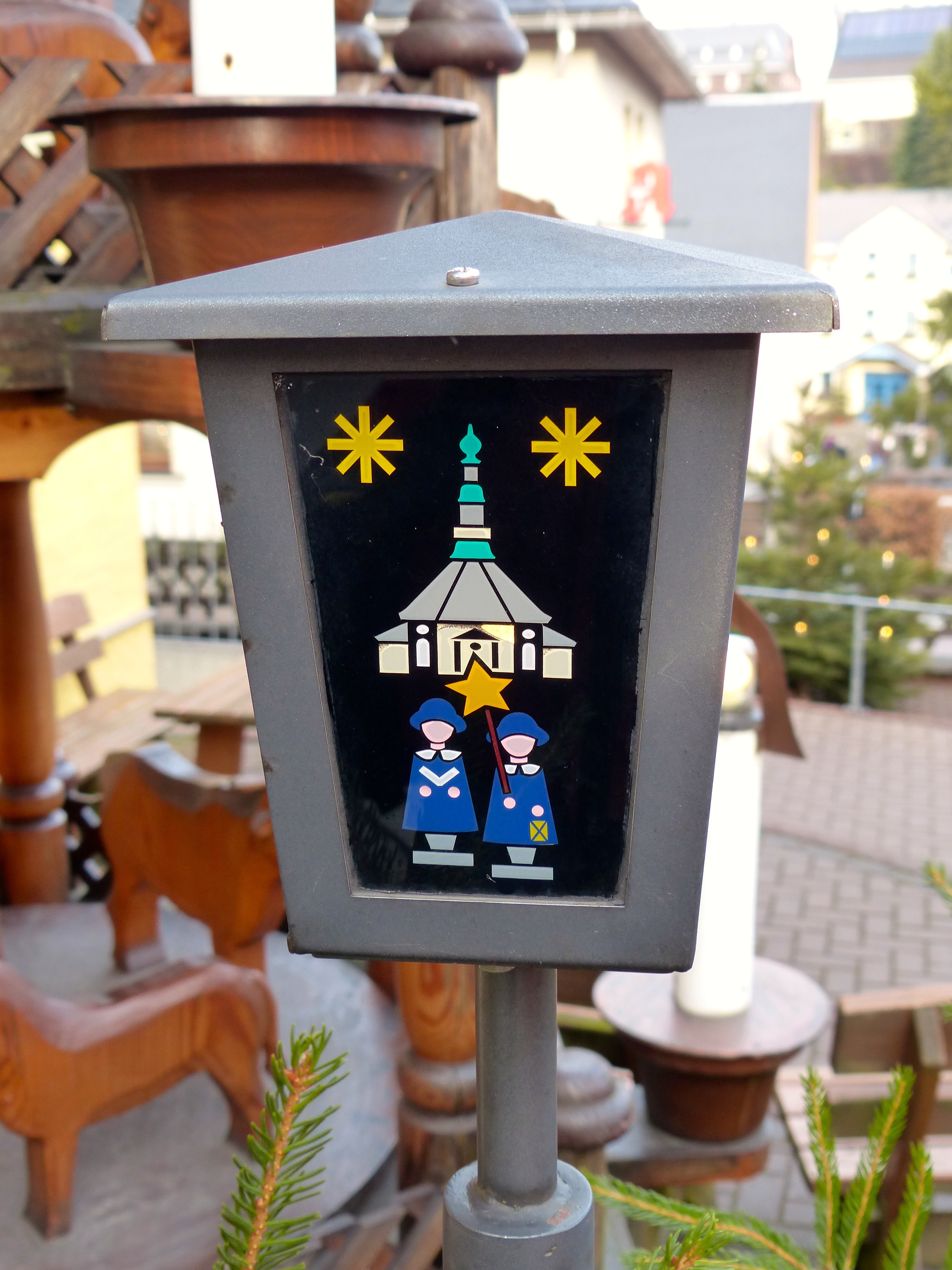 Seiffen_weihnachtliche Straßenlaterne mit Motiv der Seiffener Kirche und Kurrendesänger